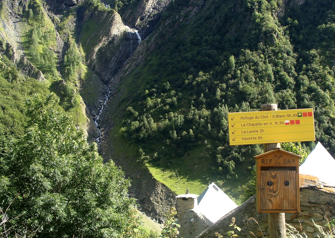 Le lieudit Rif-du-Sap (ruisseau du sapin), commune de la Chapelle-en-Valgaudémar.